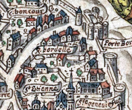 Plan de Paris dit plan de la Tapisserie ou Bonnardot (détail, porte Bordellle au débouché de l'ancienne rue Bordelle, rue Descartes actuelle)